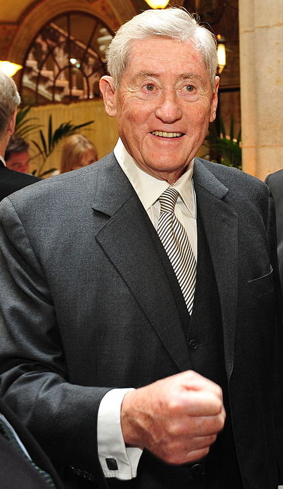 Hannes Androsch beim Geburtstagsfest für Hannes Androsch und Karl Blecha, 21.04.2013